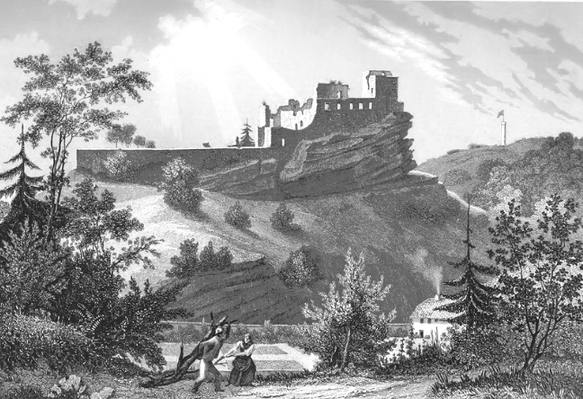 Burg Hardenberg (Nörten-Hardenberg)